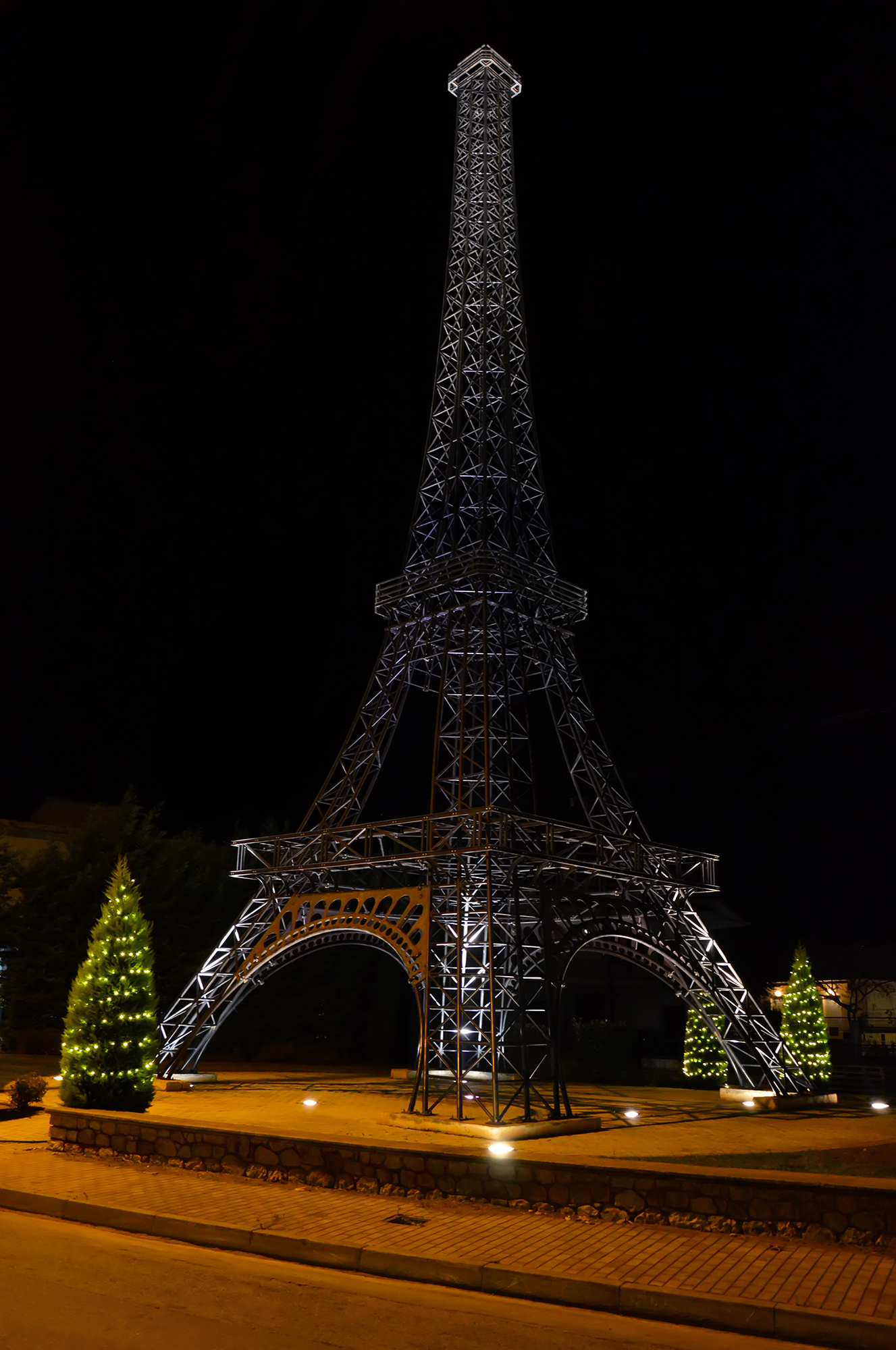 Ο πύργος του Άιφελ - Φιλιατρά Μεσσηνίας.